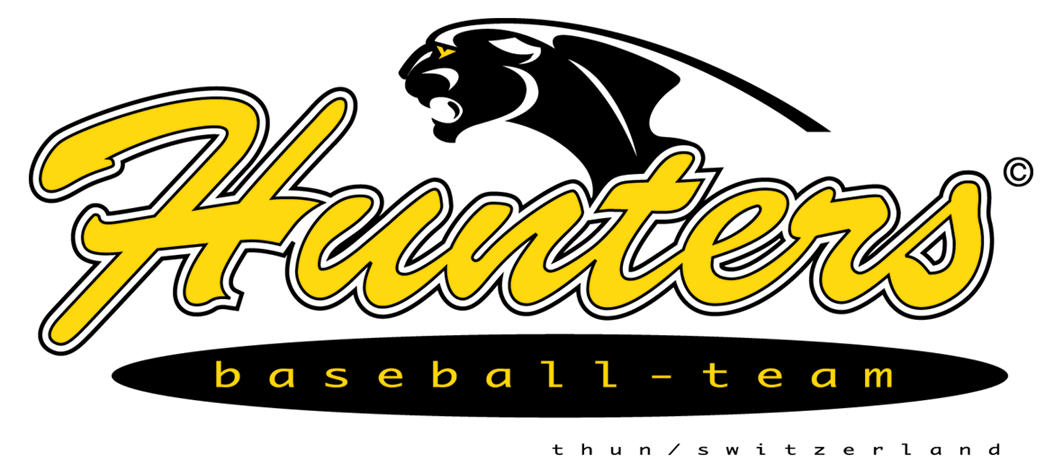 Logo des Baseball & Softball Club Hunters TV Thun